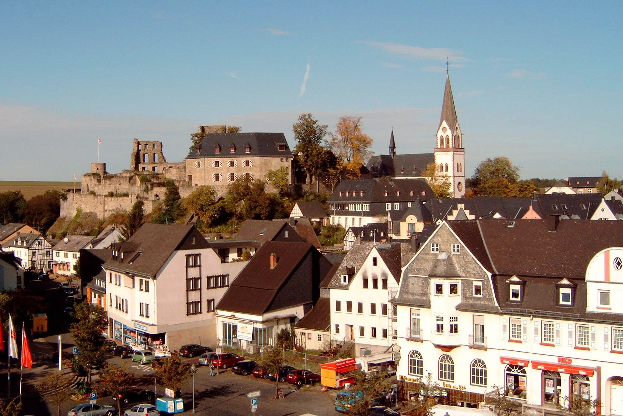 Kastellaun; Marktplatz,im Hintergrund die Kastellauner Burg und die kath. Kirche